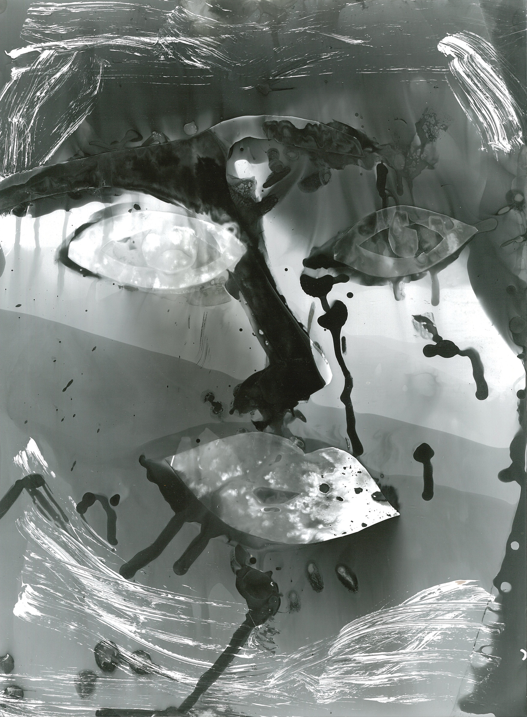 Eliška Bartek: Matka. Umrela mi maminka a ja jsem se sla na ni podivat na mrtvou. Jak tam lezela a ranila ji mrtvice a mela tak protahle rty, ztazene, tak mne to dojalo, ze jsem pak udelala tu serii photogramu...